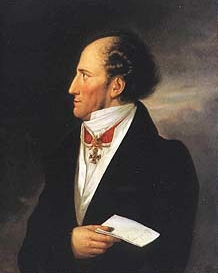 František Josef Šterberk, olejomalba Josefa Lavose z roku 1820.